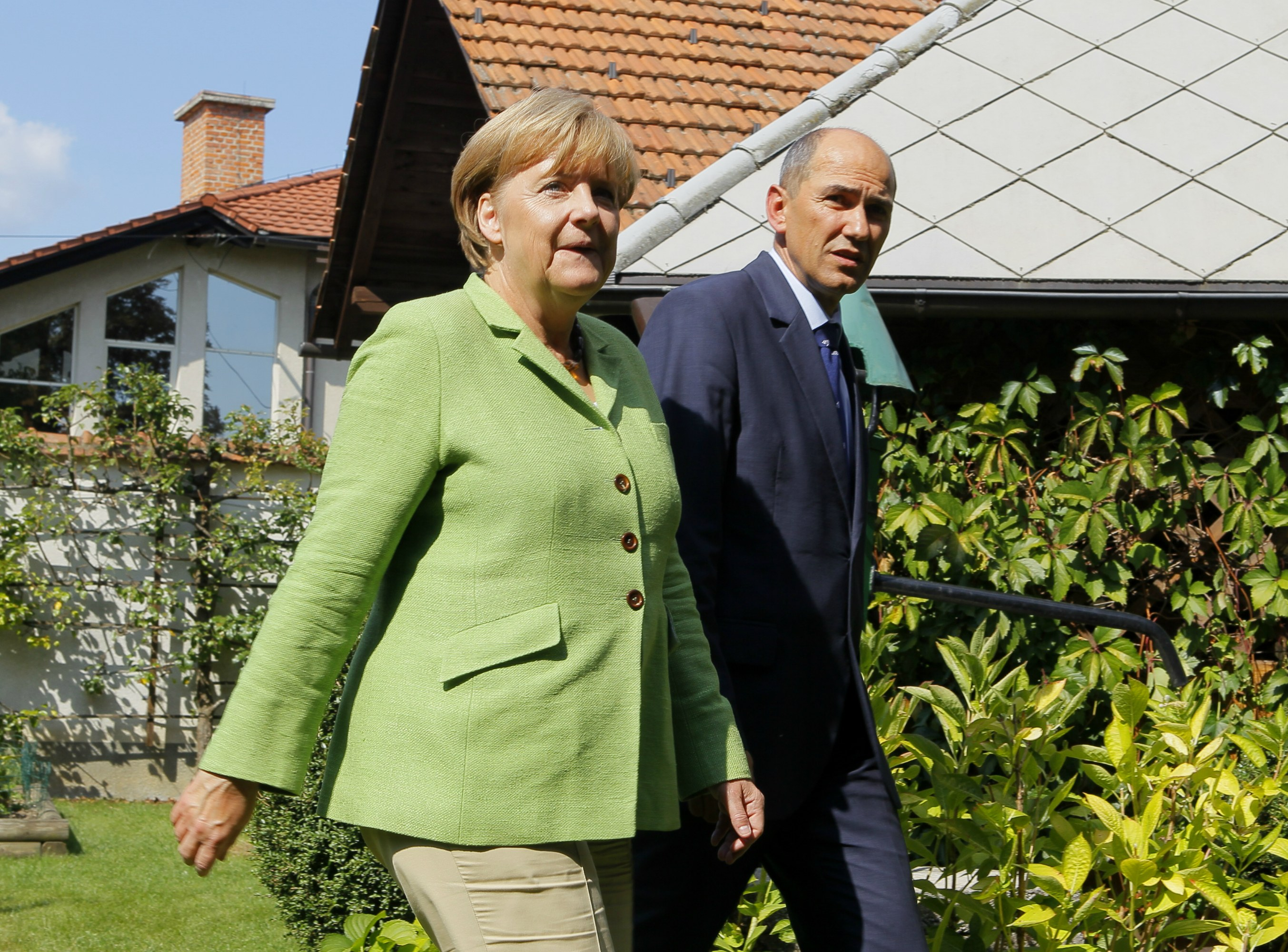 Angela Merkel in Slovenia 2011